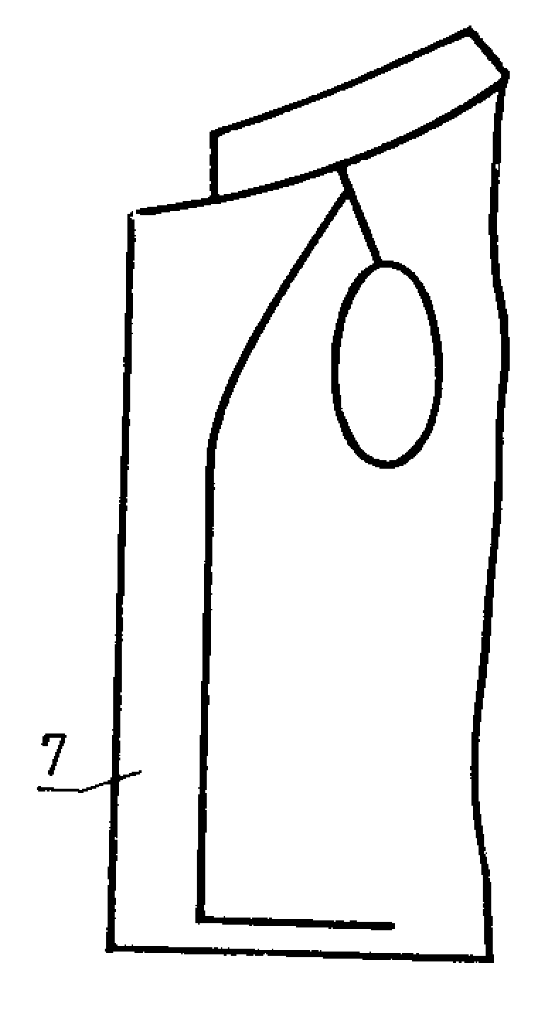 Изображение из ГОСТ 22977-89 (СТ СЭВ 6484-88) — Детали швейных изделий. Термины и определения.